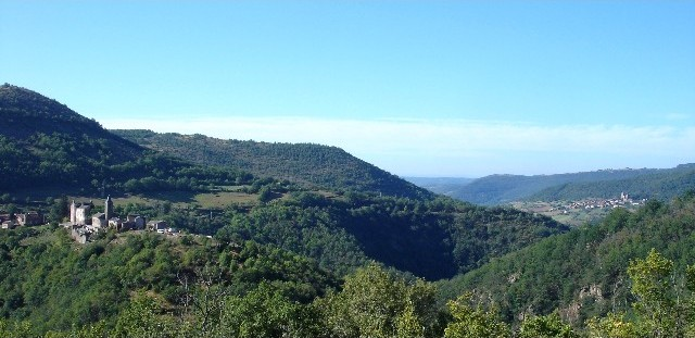 La vallée de La Muze